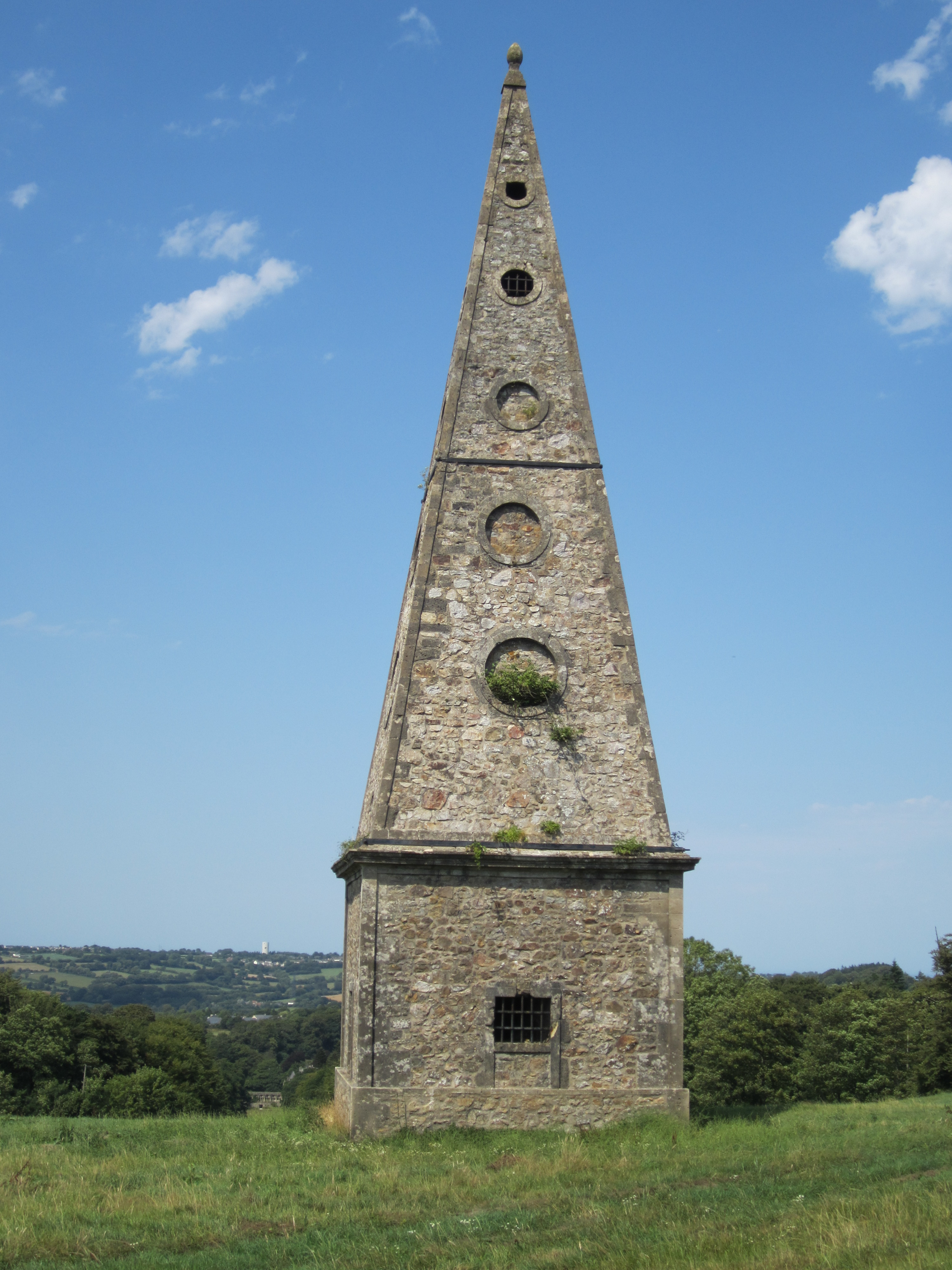 Gloriette construit au XVIIIe par les chatelins des Du Moncel à l'extrémité du parc du château de Martinvast .